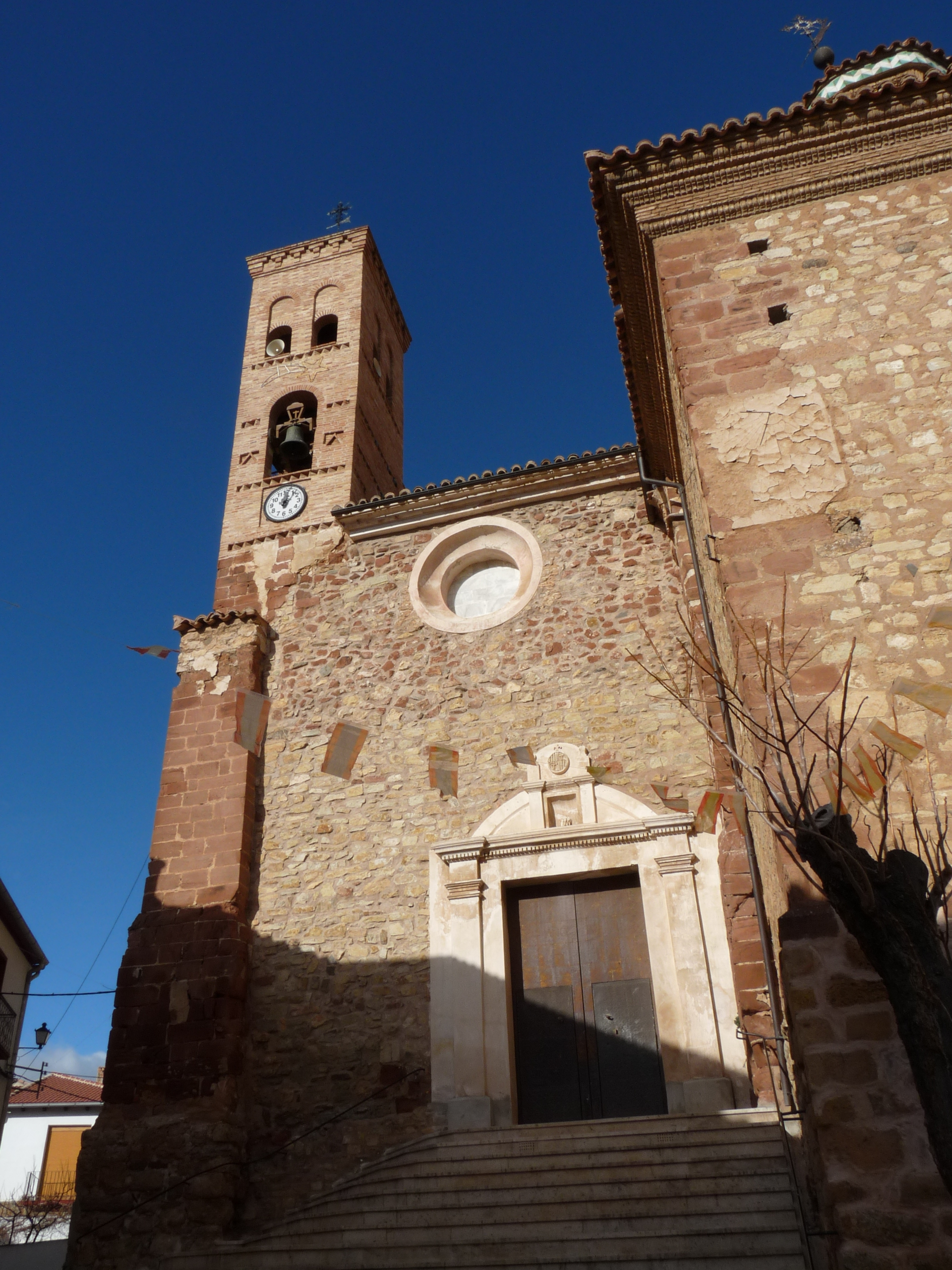 La Hoz de la Vieja - Iglesia de Nuestra Señora de las Nieves (finales del XV o principios del XVI) - Portada y torre románico-mudéjar